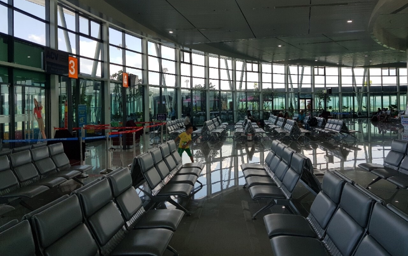 Phòng chờ, nhà ga T1